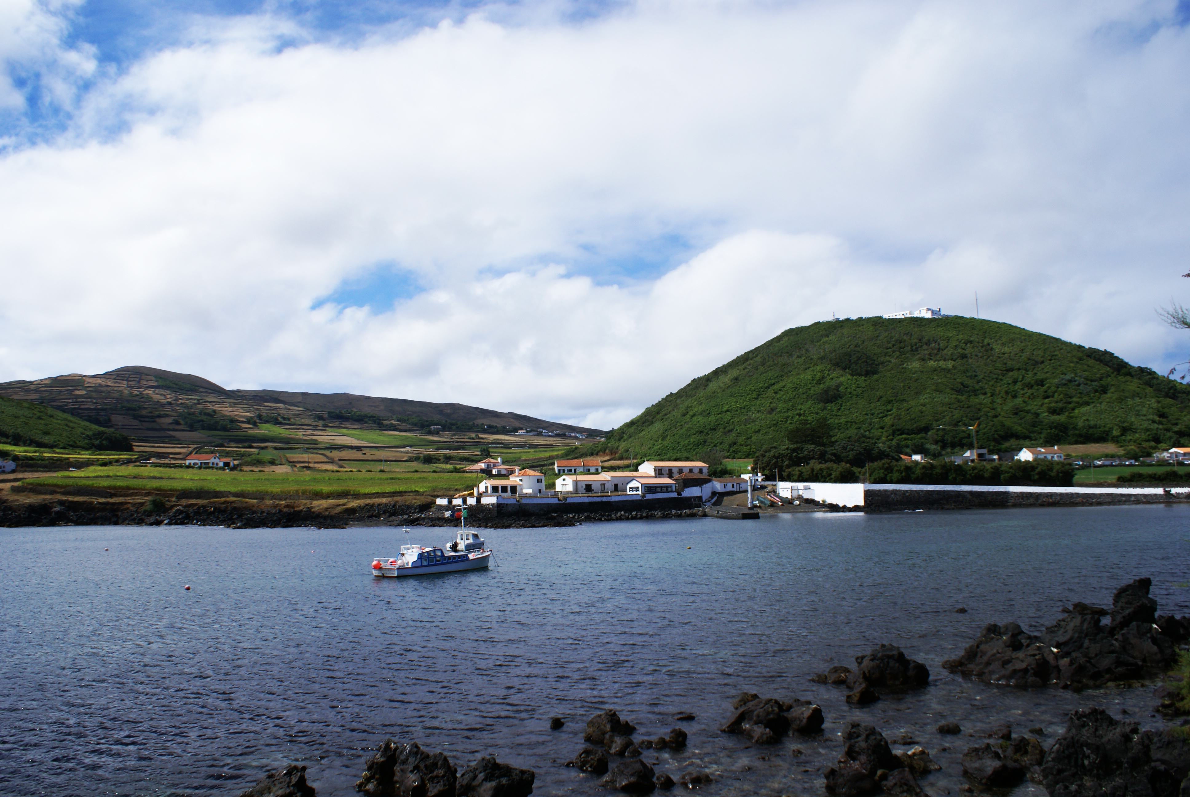 Baía da Barra, entrada, Santa Cruz da Graciosa, ilha Graciosa, Açores, Portugal